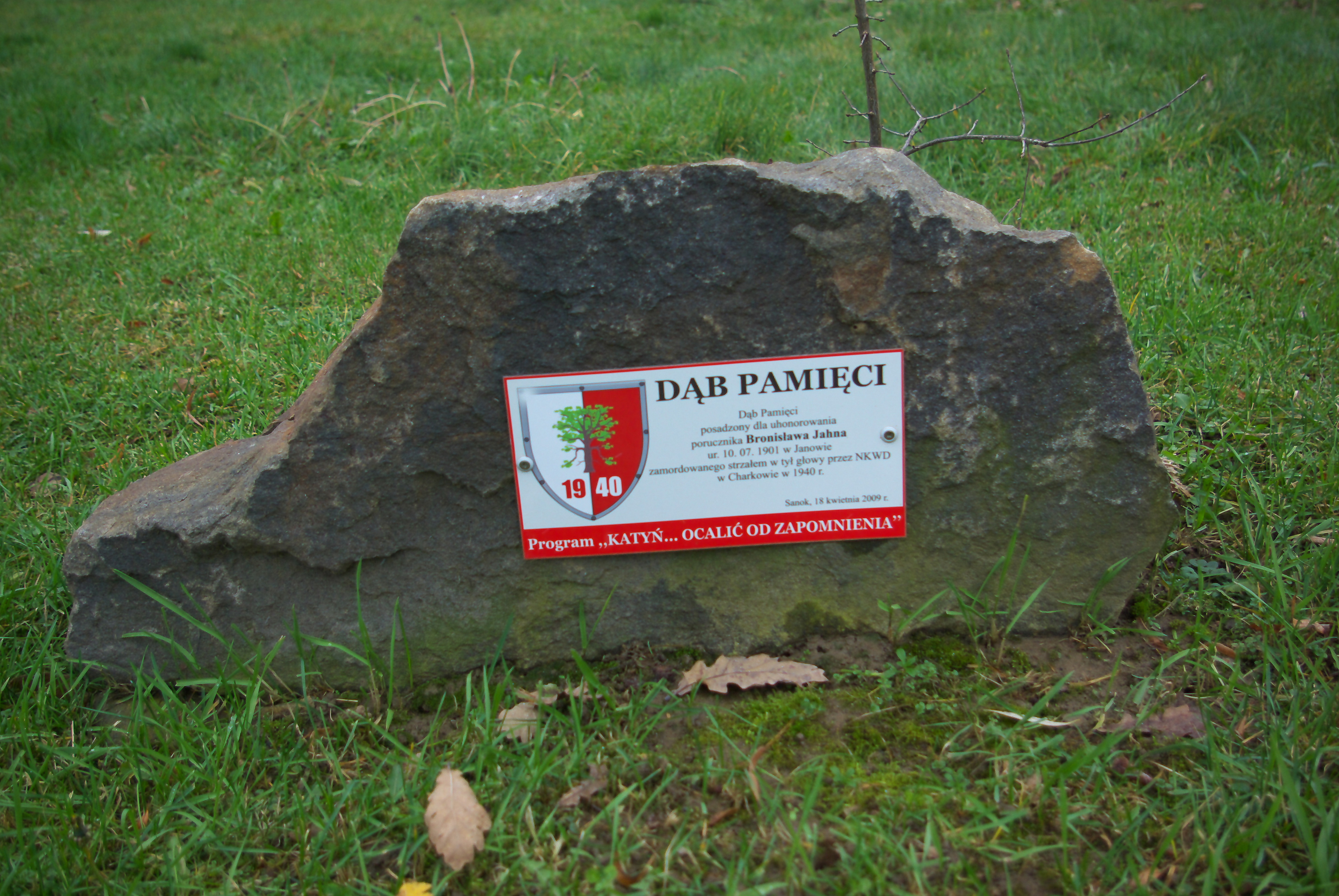 Dąb Pamięci Bronisława Jahna w ramach Pomnika Golgota Wschodu na Cmentarzu Centralnym w Sanoku.